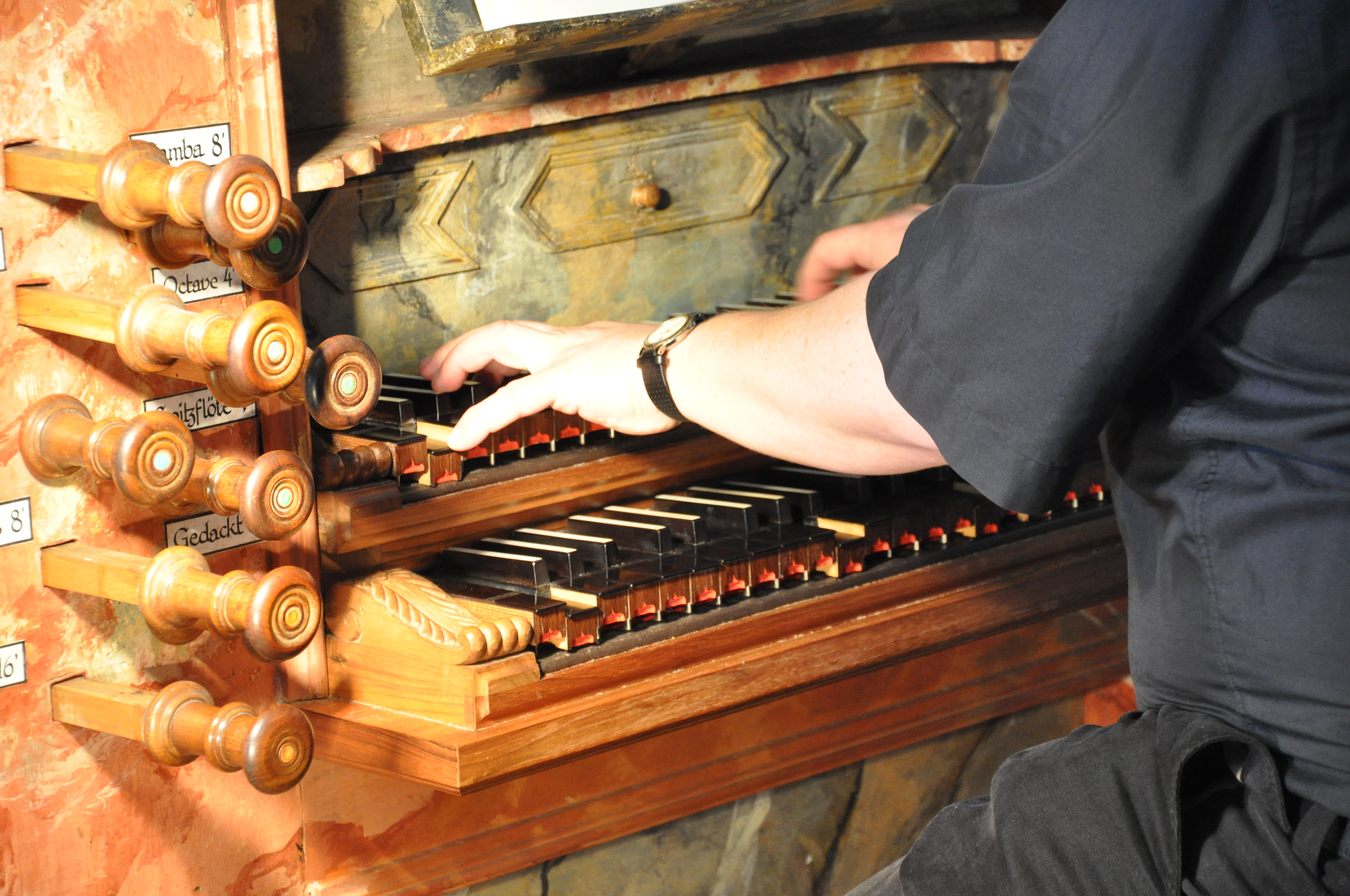 Kloster Sankt Katharinental (Diessenhofen), Klosterkirche Orgel von Johann Jakob Bommer, 1735–1741 (restauriert von Kuhn 1965-1969), Spieltisch, die Manual-Schiebekoppel in Aktion